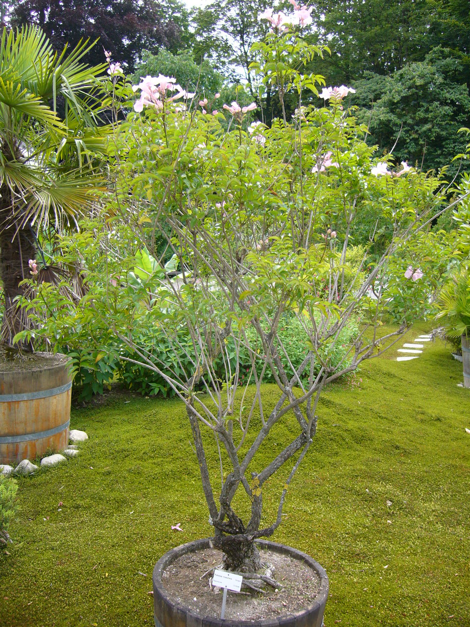 Podranea ricasoliana: Shrub